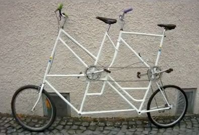 Tandemtallbike